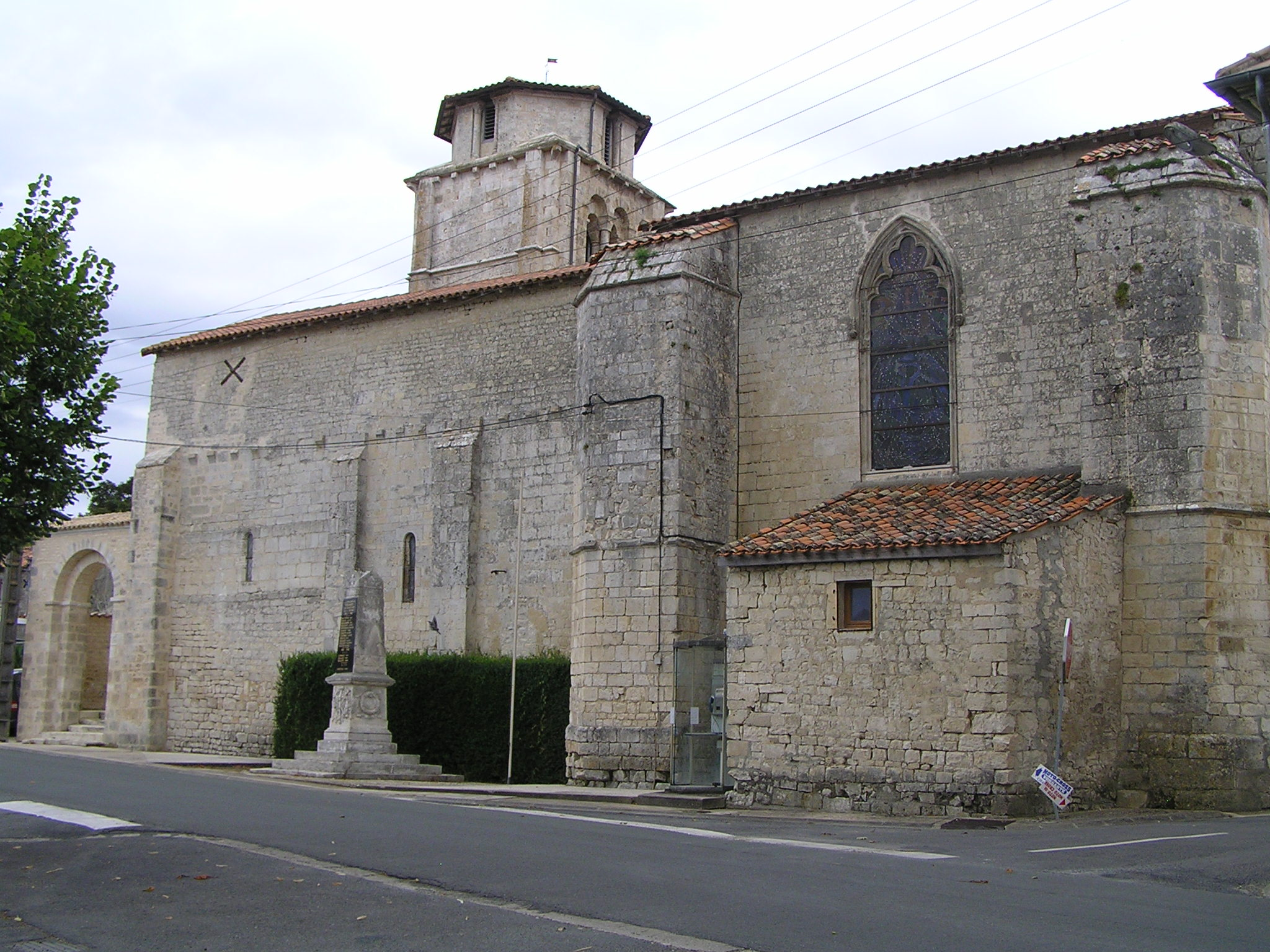 église de Vouharte